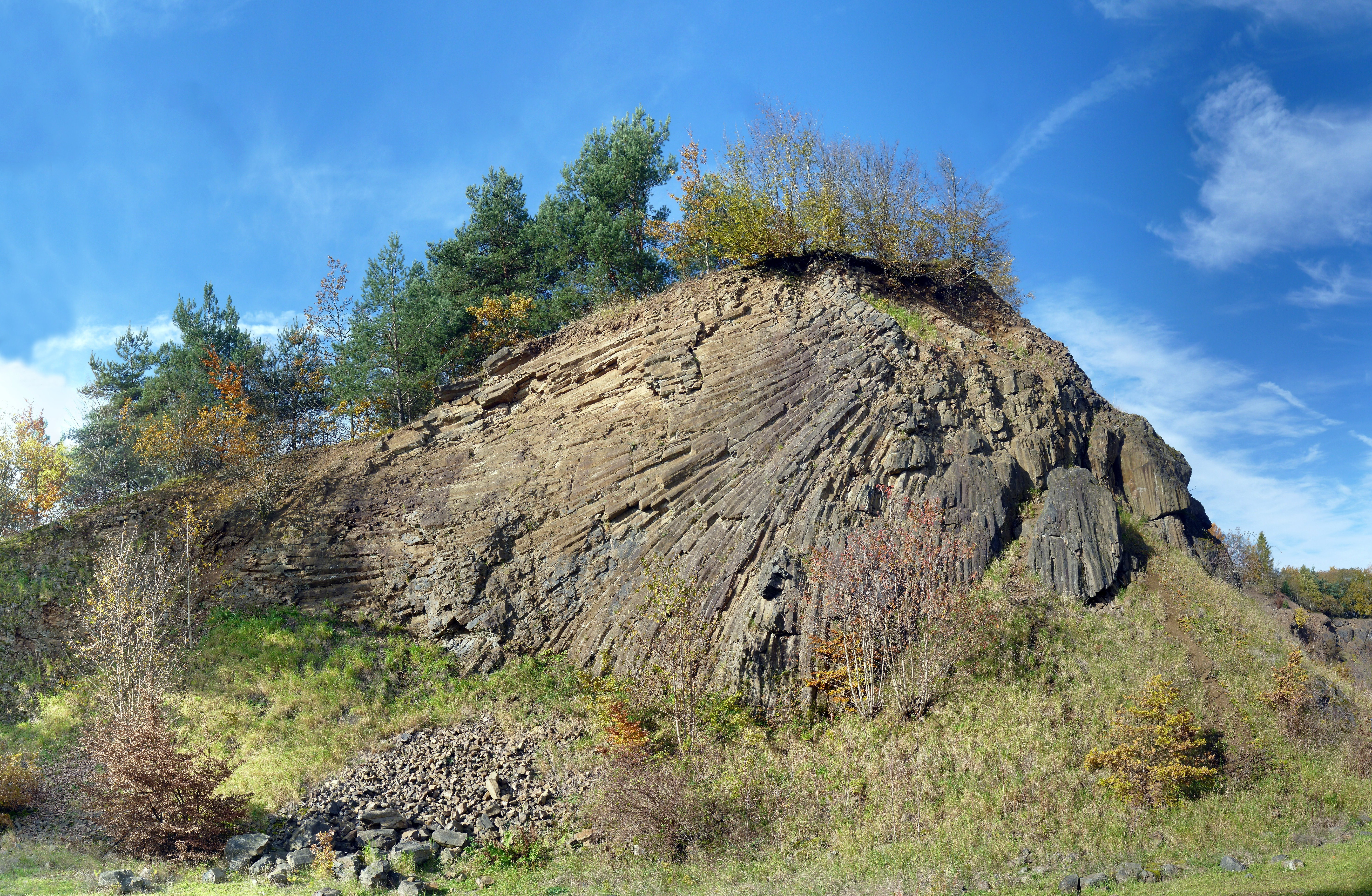 Lindenstumpf